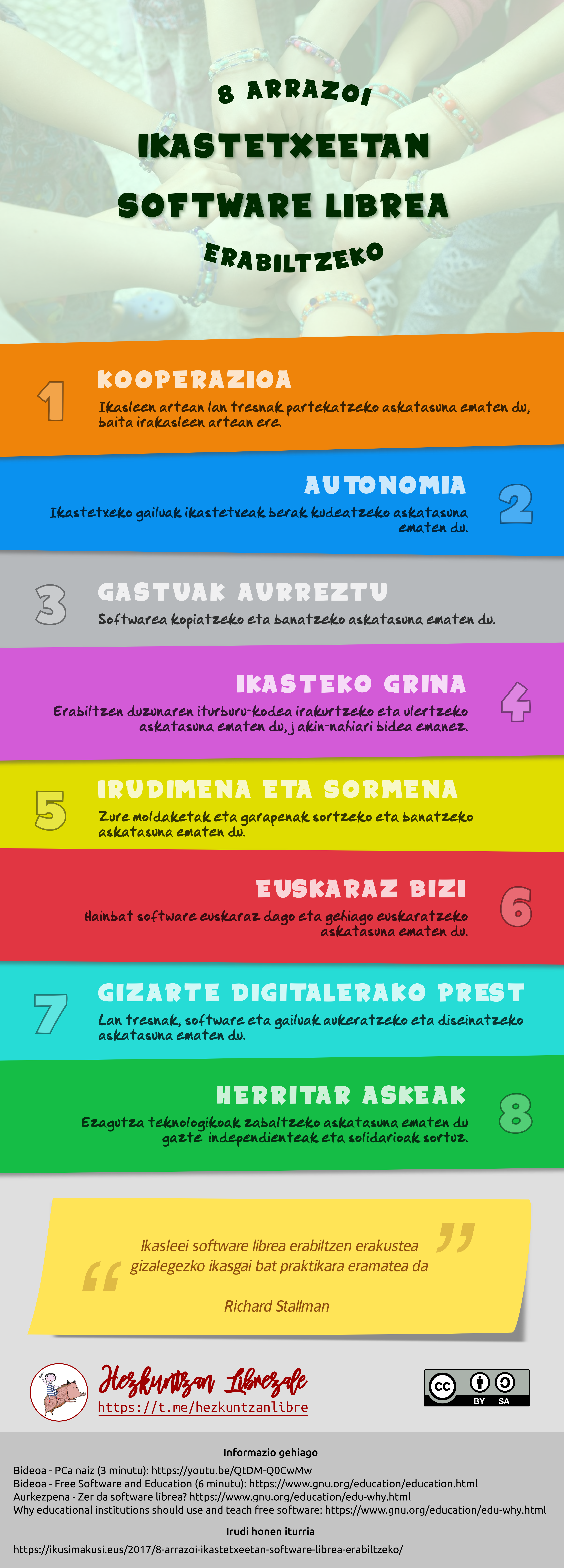 Ikastetxeetan Software Librea erabiltzearen aldeko zenbait arrazoi.